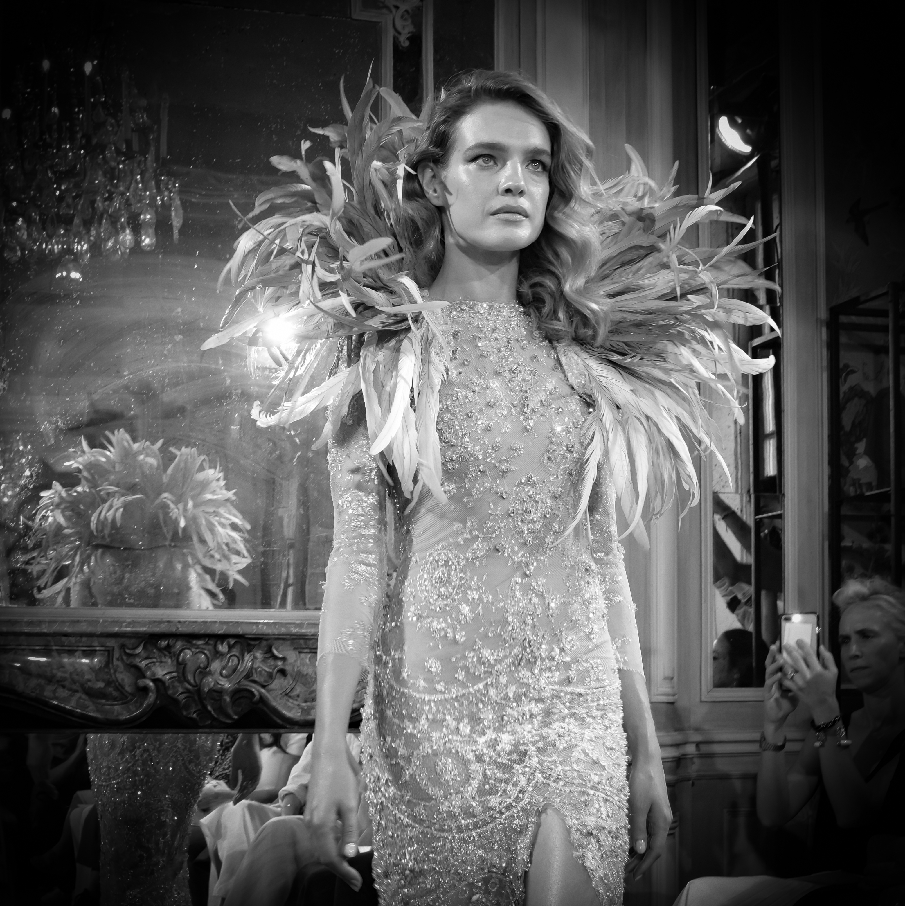 Natalia Vodianova photographiée par Gil Zetbase pendant la fashion week de Paris 2018